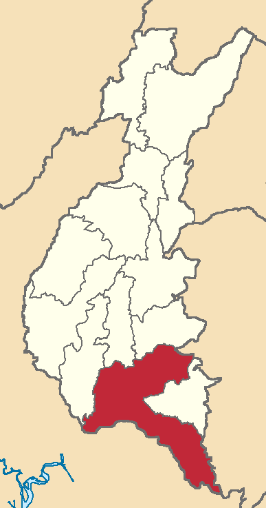 Mapa localizador del cantón en Los Ríos, Ecuador